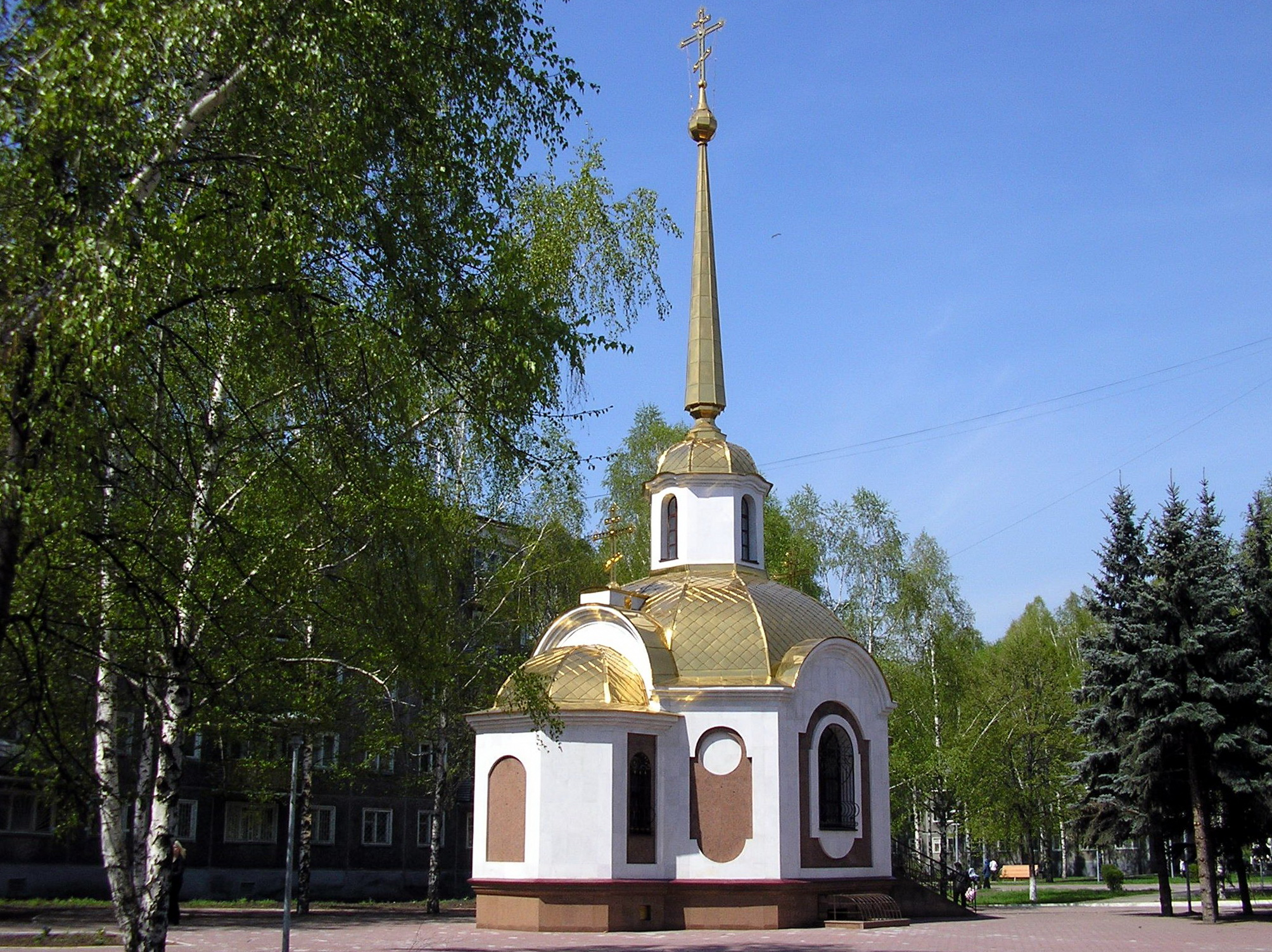 Часовня Георгия Победоносца